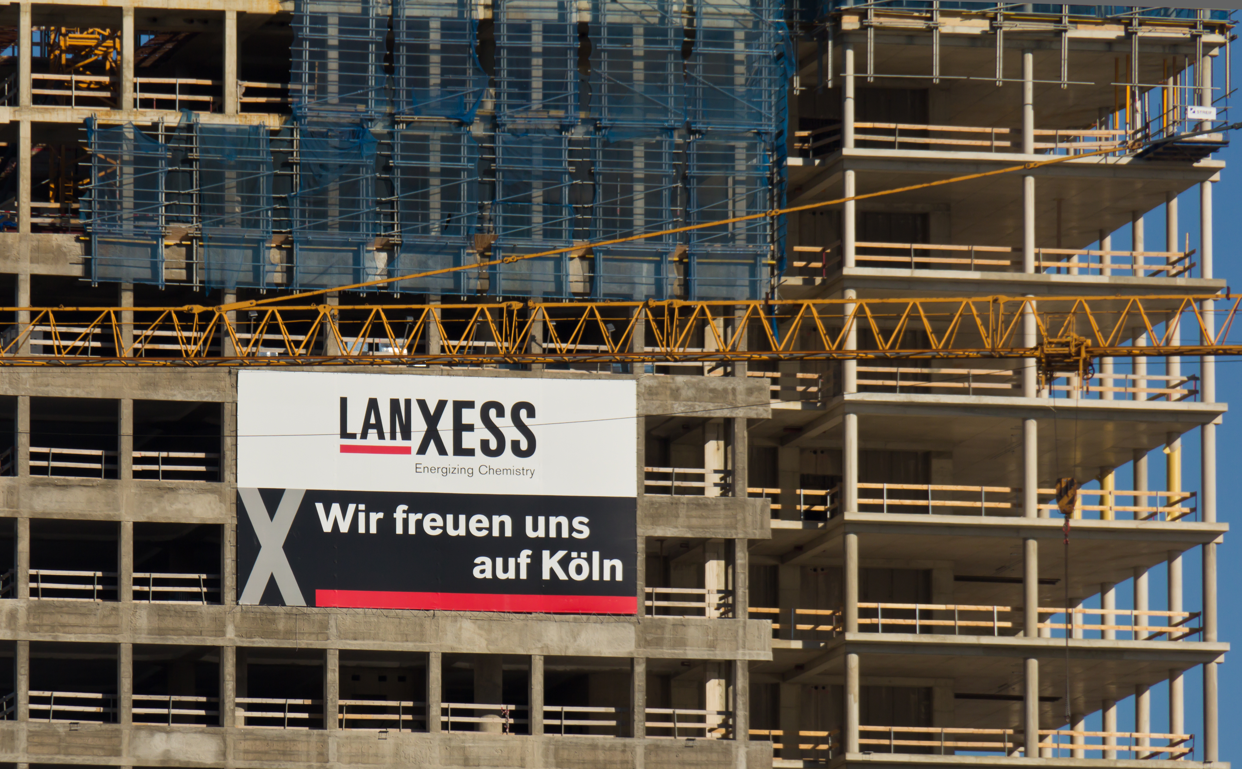 Laxess-Banner am maxCologne-Rohbau im September 2011, Ansicht vom linken Rheinufer. Text auf dem Banner: "LANXESS. Wir freuen uns auf Köln"